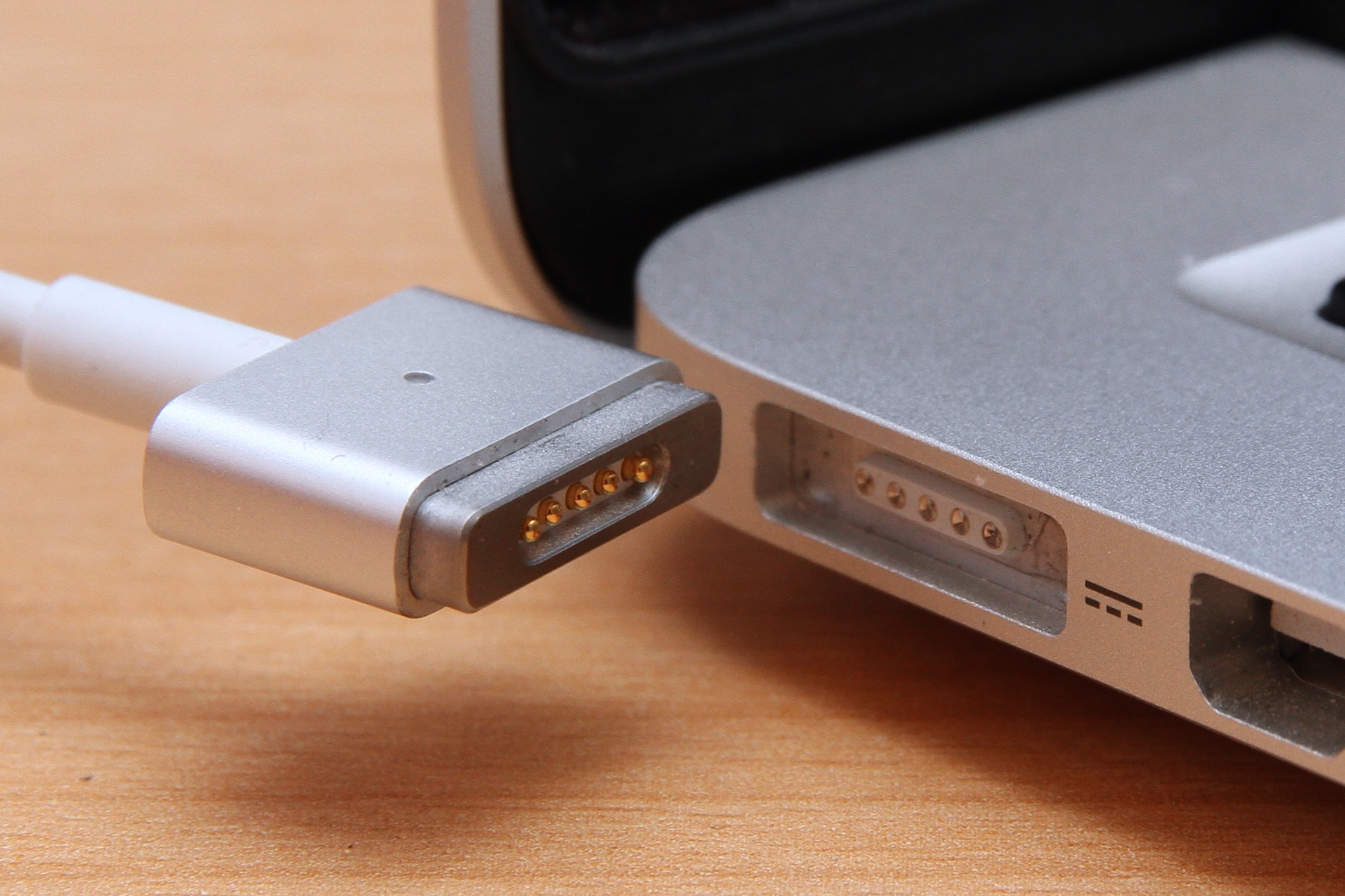 MagSafe 2 Stecker an einem MacBook Pro 13 Zoll (Retina)